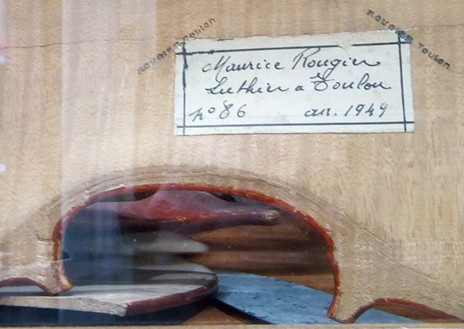 Viòulon dau laütier tolonenc Maurici Rogier - Atalhier L'Arròca ("Larroque")